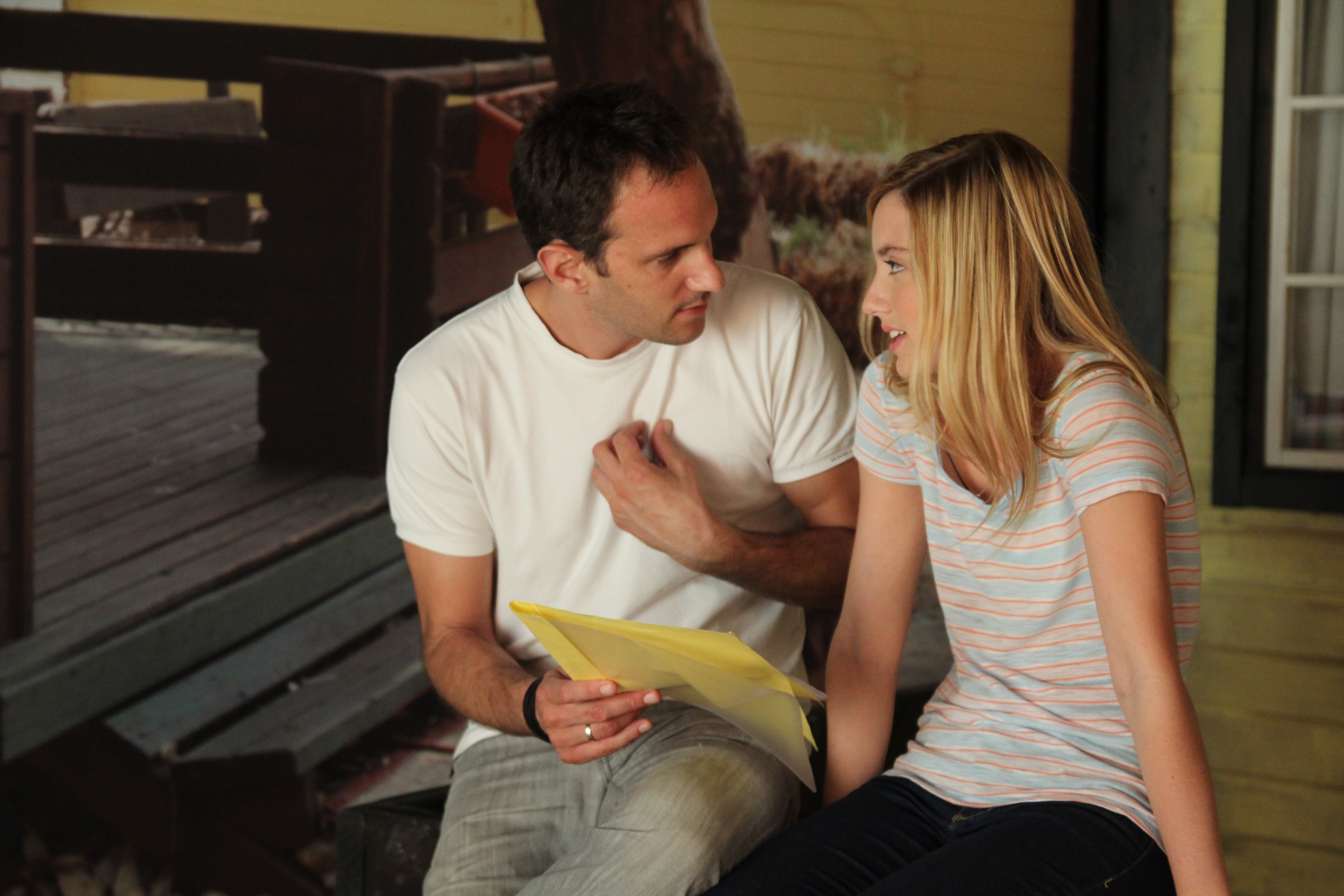 תמונה מתוך הסט של סדרת הטלוויזיה גאליס